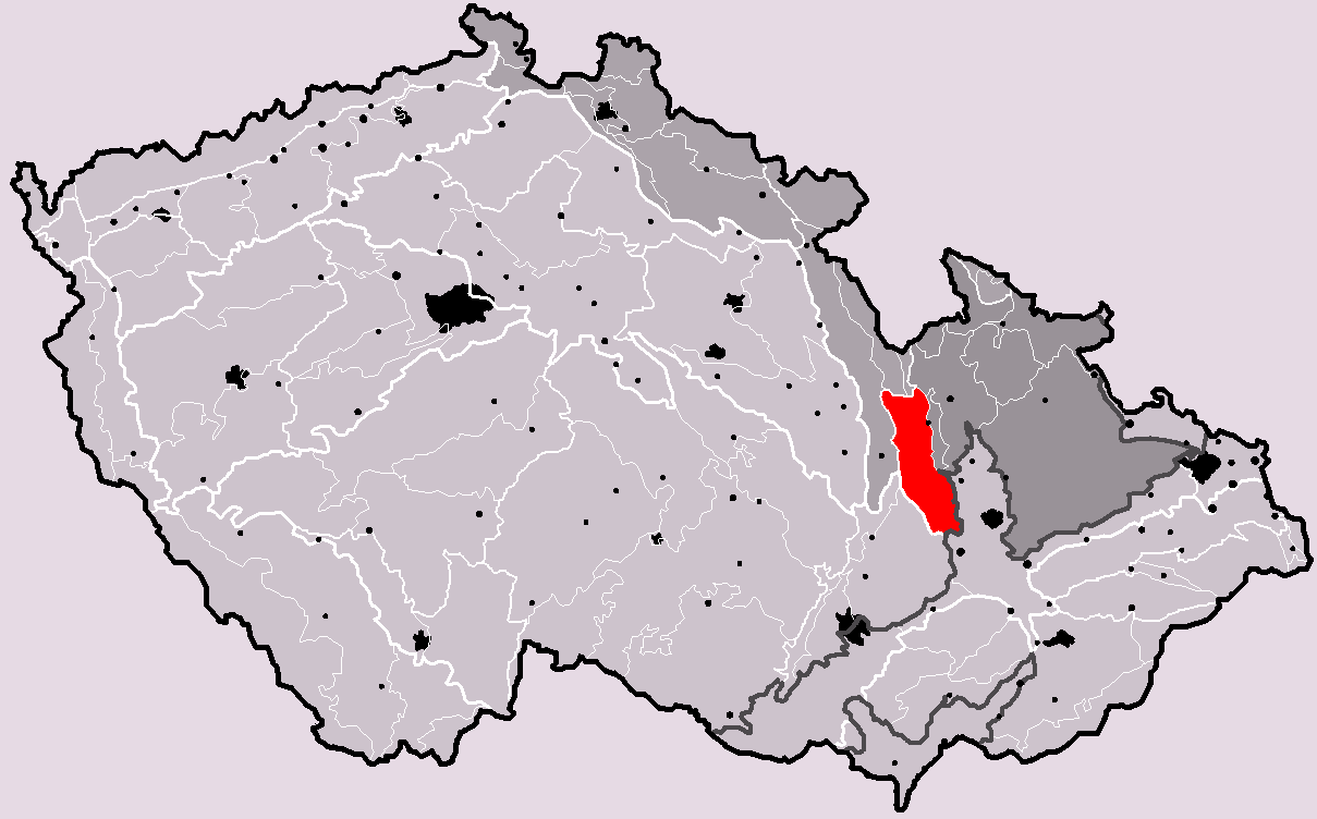 Poloha geomorfologického celku Zábřežská vrchovina v rámci České republiky. Hercynský systém Hercynská pohoří I Česká vysočina I4 (IV) Krkonošsko-jesenická subprovincie I4C (IVC) Jesenická oblast I4C-1 (IVC-1) Zábřežská vrchovina